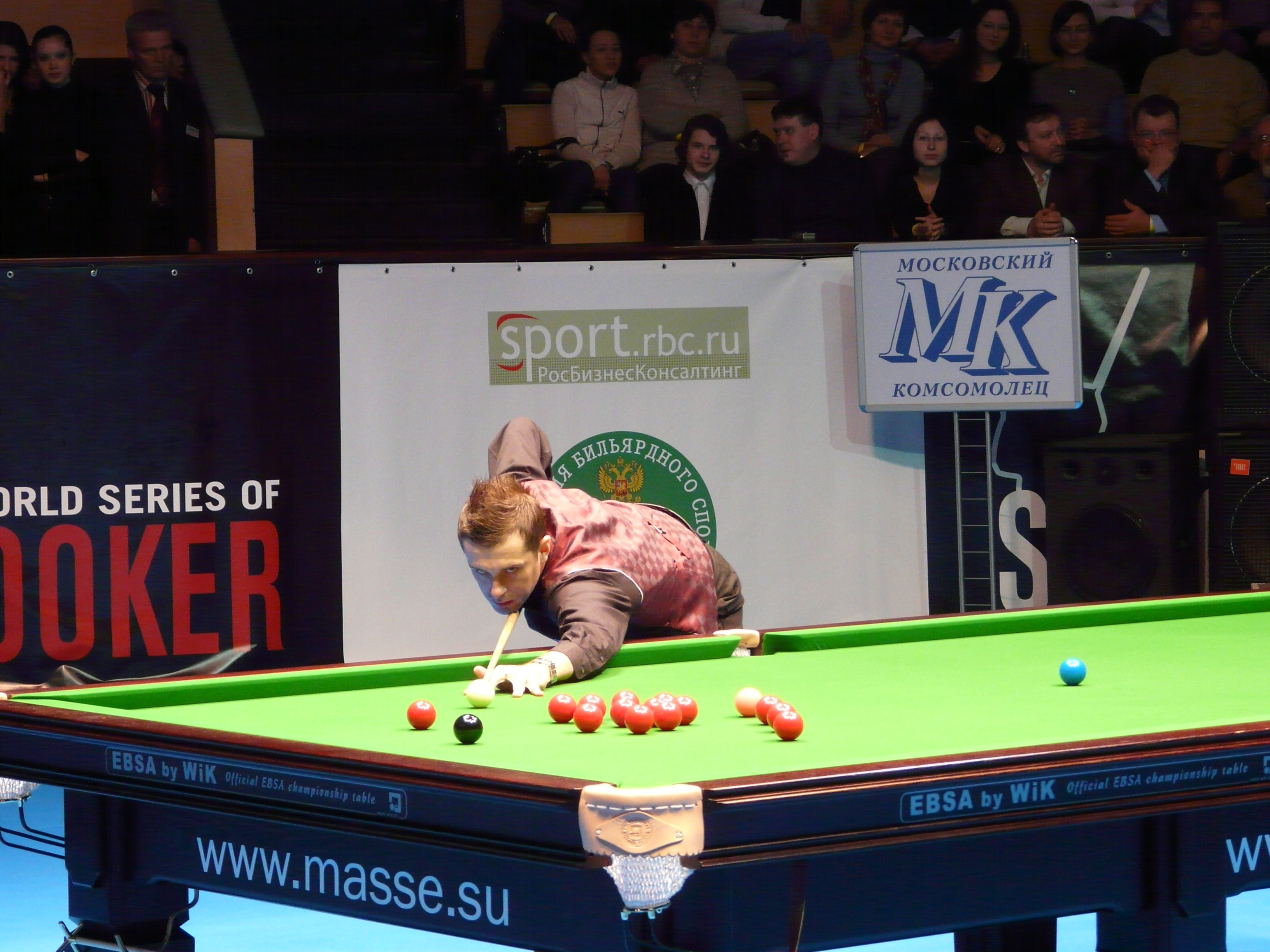 Туринир World Series of Snooker в Москве